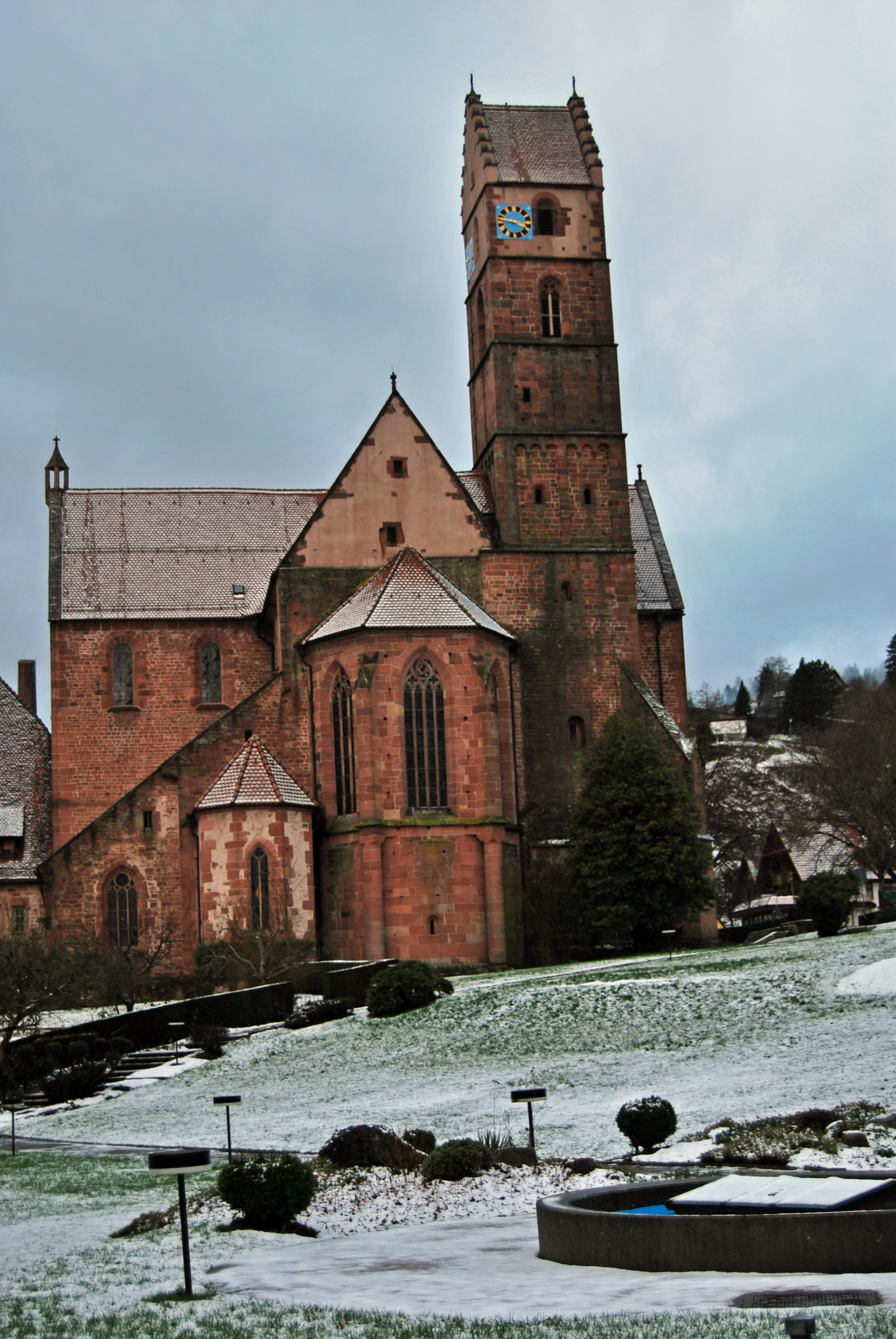 Kloster Alpirsbach